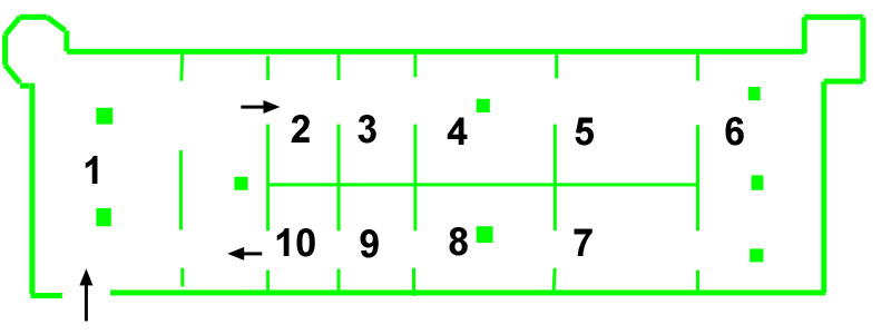 Structure of 'Grünes Gewölbe' in Dresden, Germany